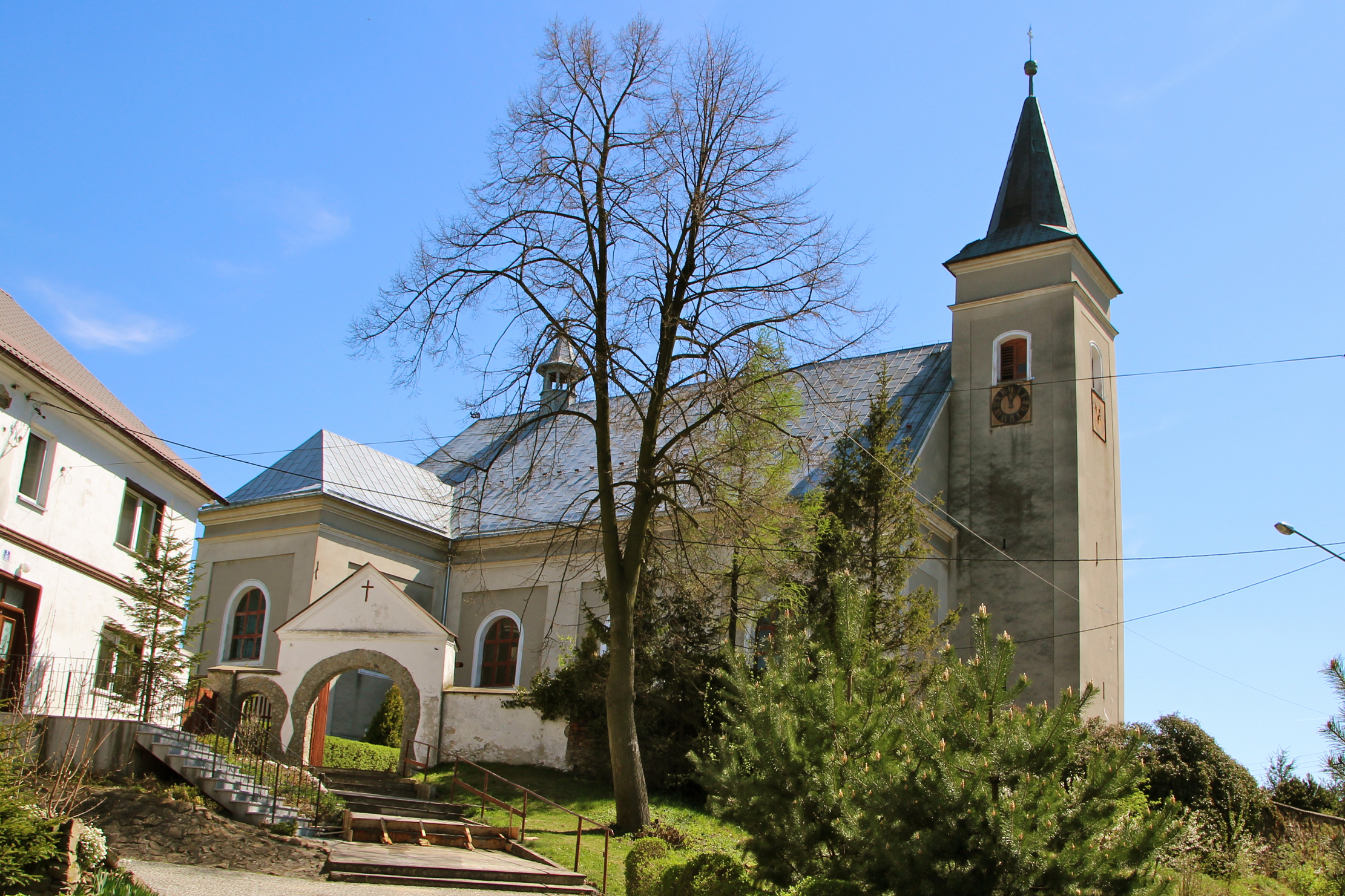 Opawica - kościół parafialny p.w. Świętej Trójcy, 1701-1796, 1829 (zabytek nr 120/54 z 25.08.1954)